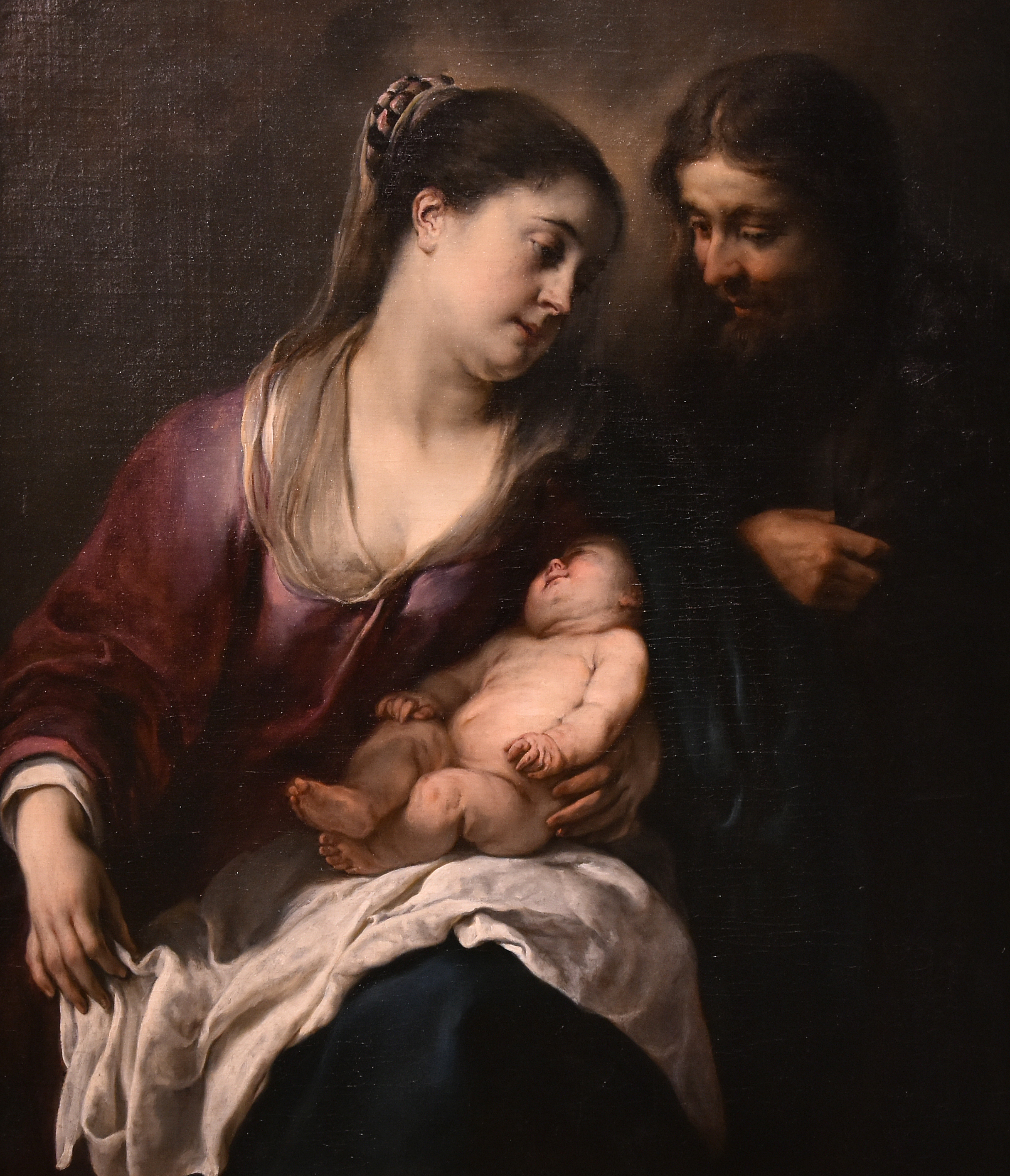 Jan Cossiers (1600-1671) De Heilige Familie - Musée Calvet Avignon